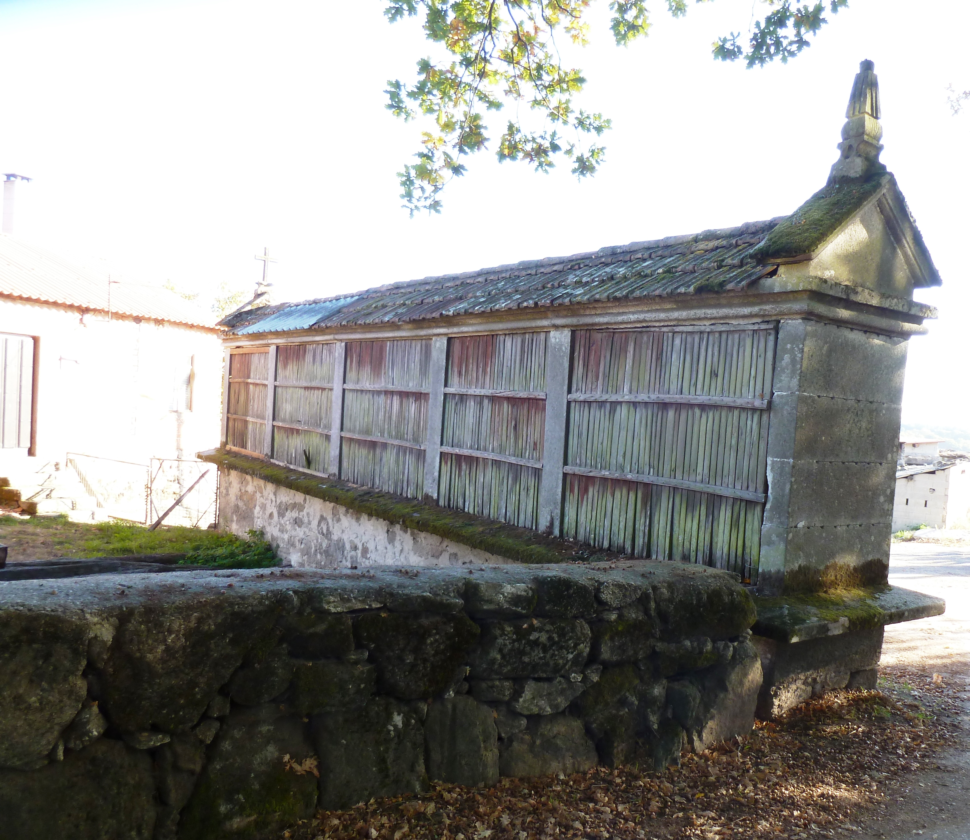 Hórreo na Ermida, Milleirós, Carballedo